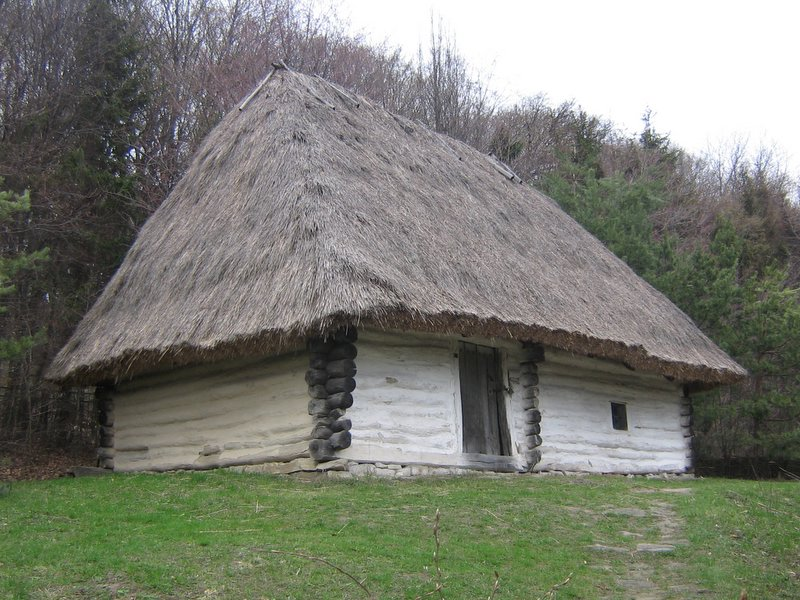 Хата з села Сімерки Закарпатської області